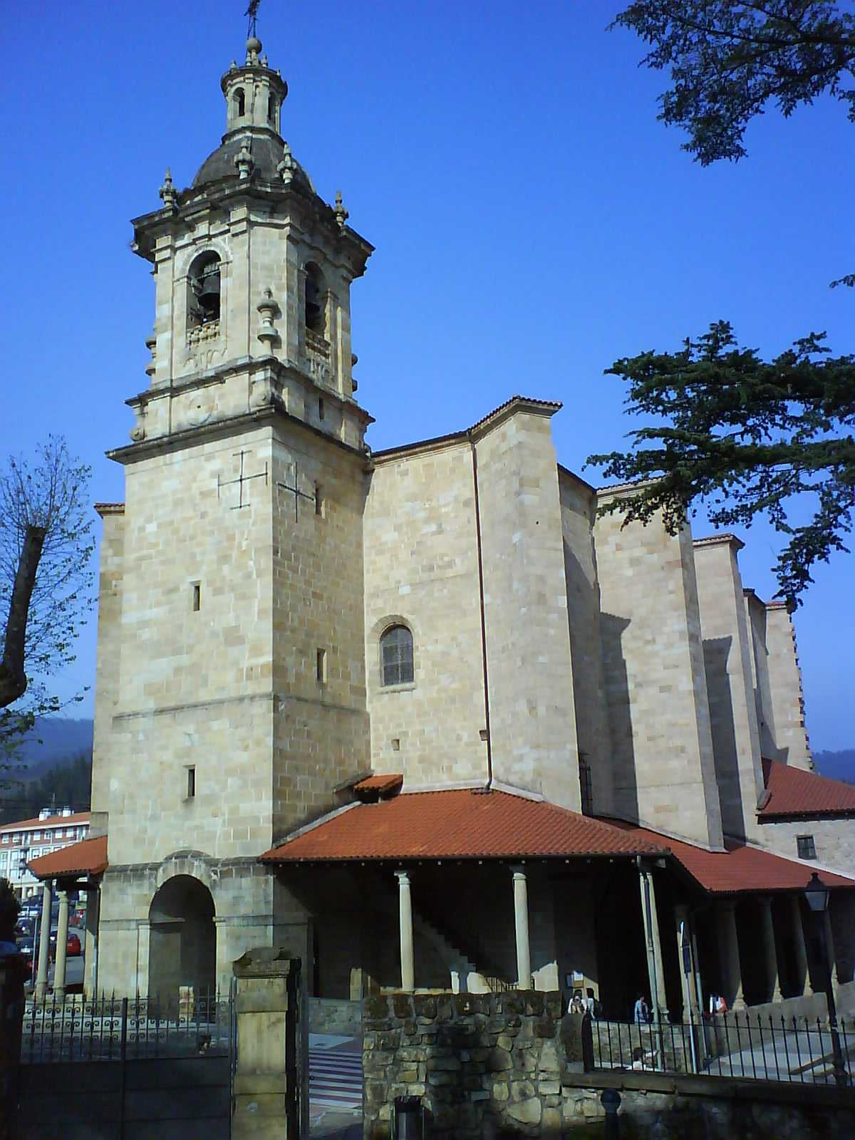 Iglesia parroquial de Berriz, Vizcaya (País vasco) (España).